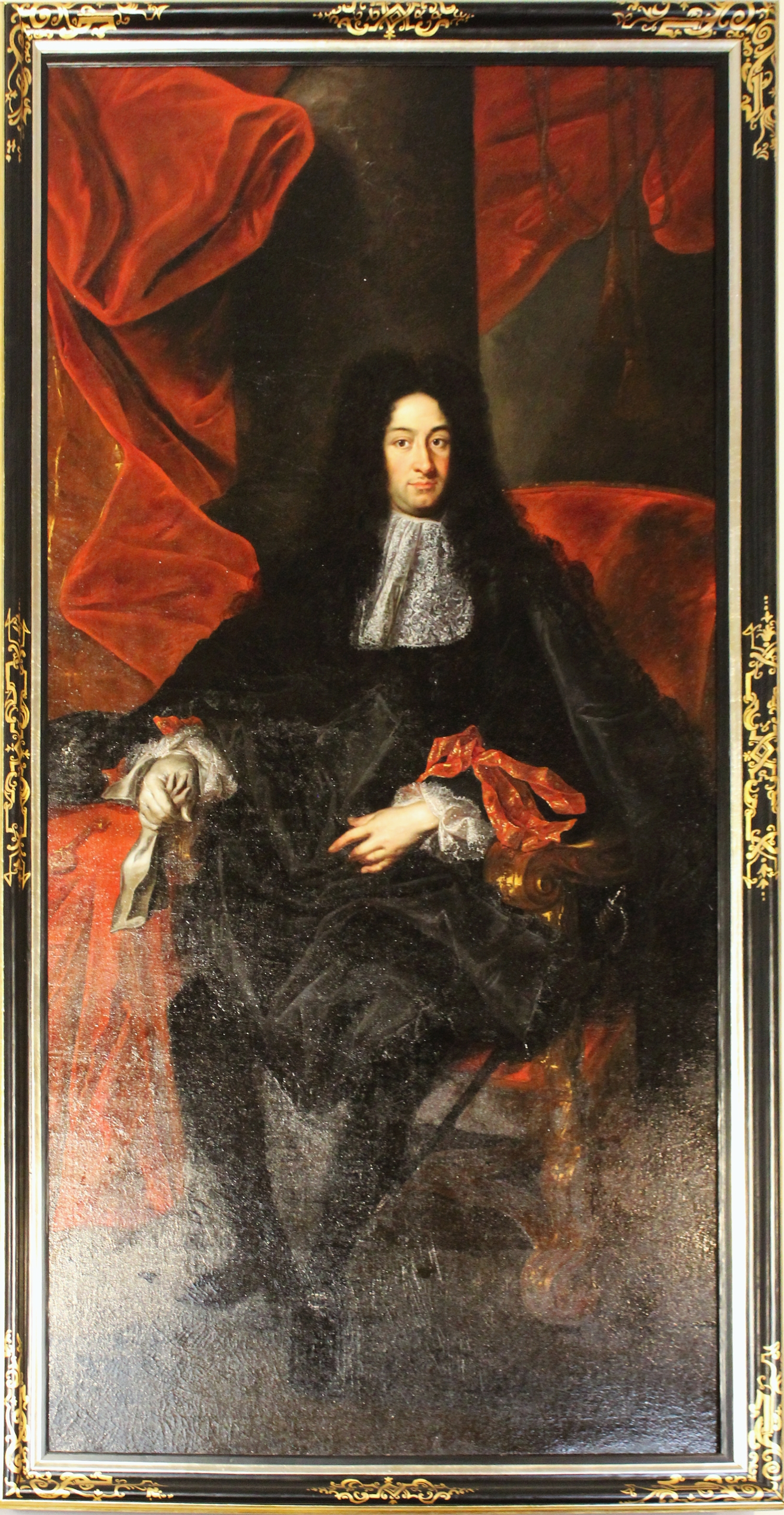 Černínové. Diplomaté, cestovatelé, sběratelé - výstava na zámku v Jindřichově Hradci